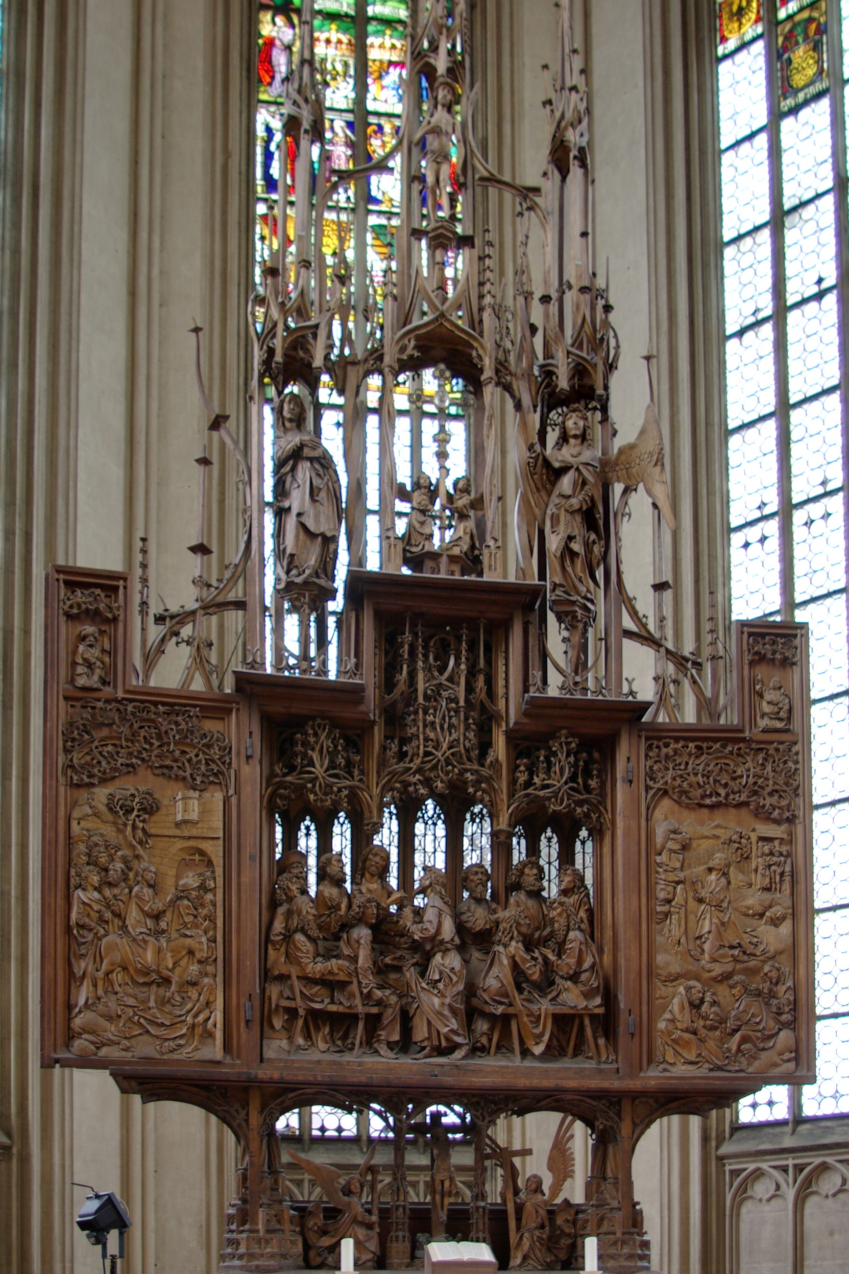 Rothenburg ob der Tauber, Heilig-Blut-Altar von Tilmann Riemenschneider in der St. Jakobs Kirche